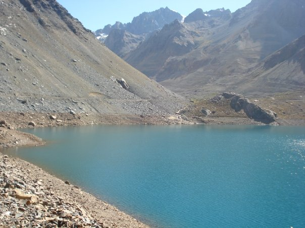 Vista de la laguna de Los Cristales, Rengo, Chile